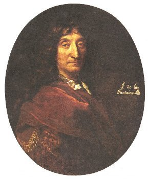 Portrait of Jean de la Fontaine (1621–1695)